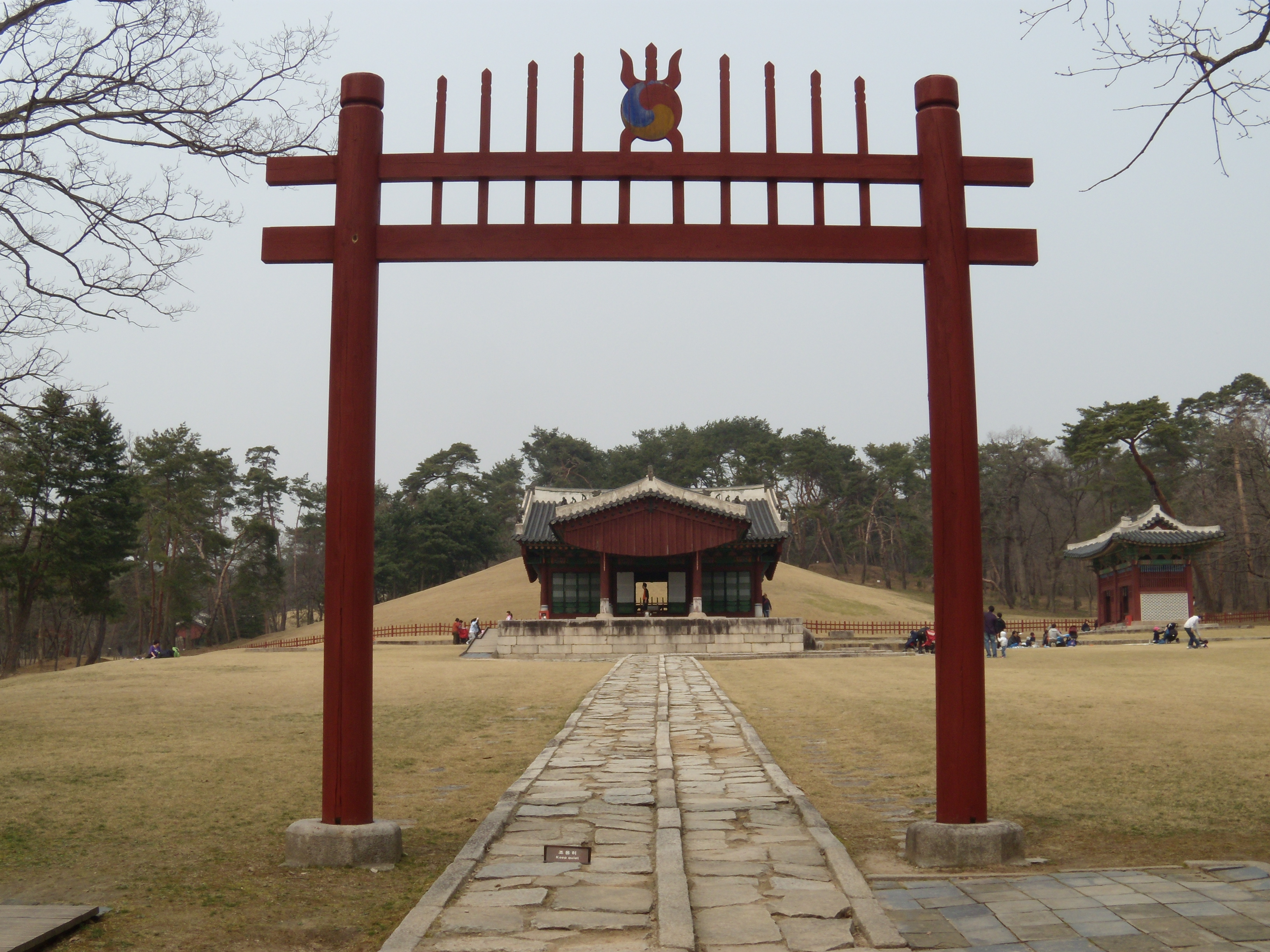 동구릉 내에 있는 익종(문조)의 수릉